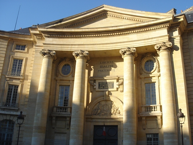 Façade de la faculté de droit de l'Université de Paris, place du Panthéon. Architecture de Soufflot.